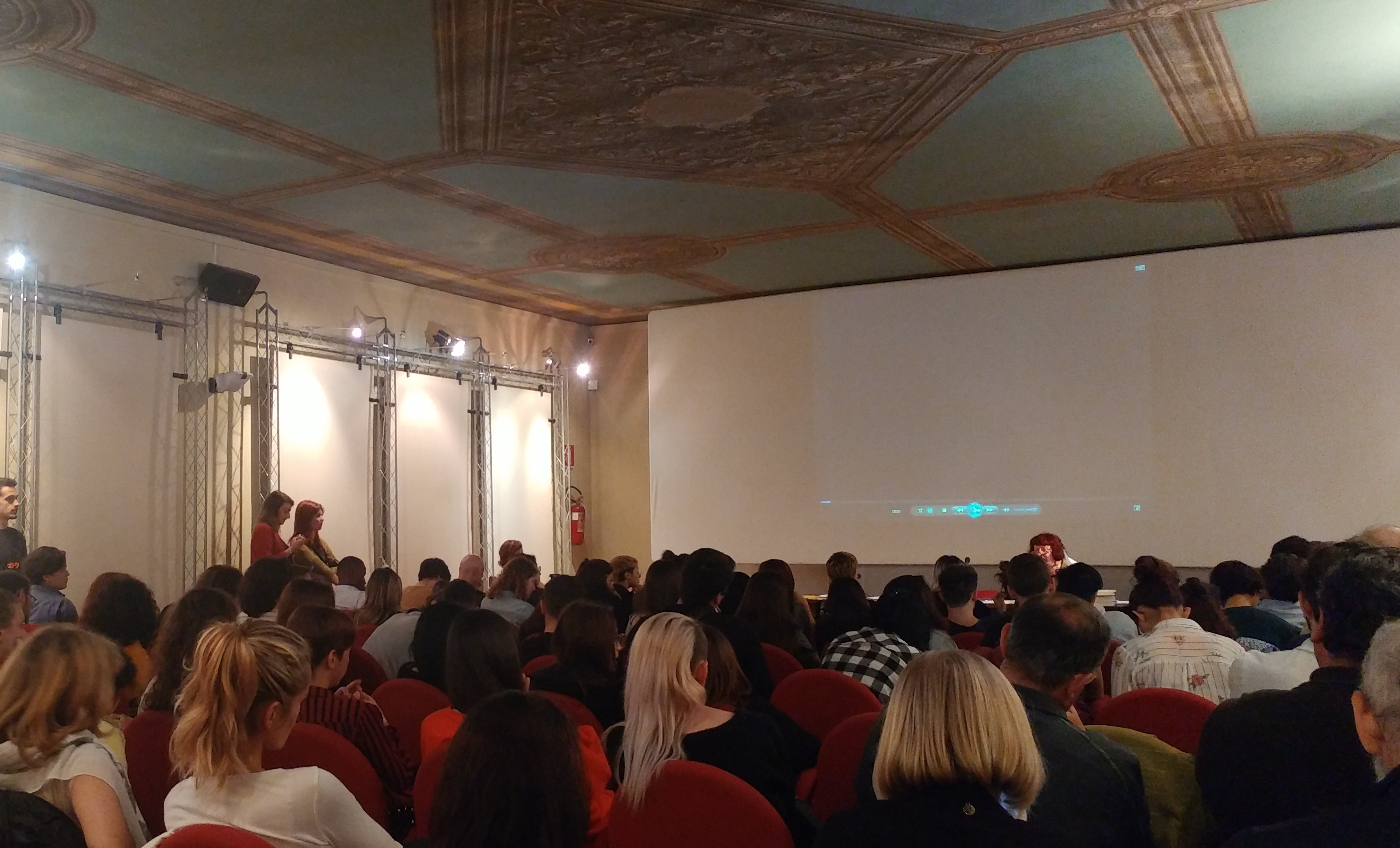 Evento in Sala Conferenze e Proiezioni al secondo piano di Palazzo San Celso.